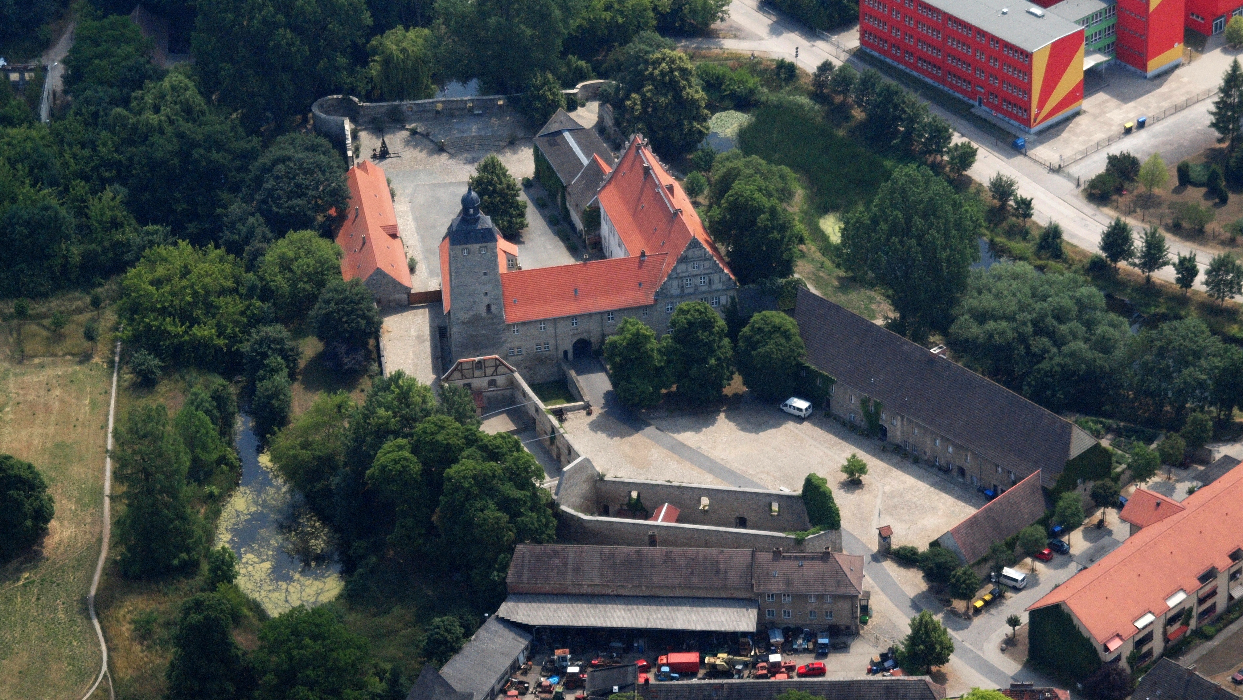 Wasserburg Egeln, Luftaufnahme (2015)